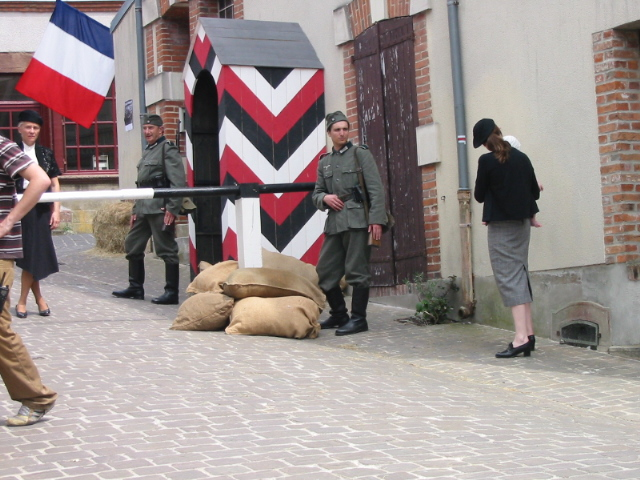 La cicatrice